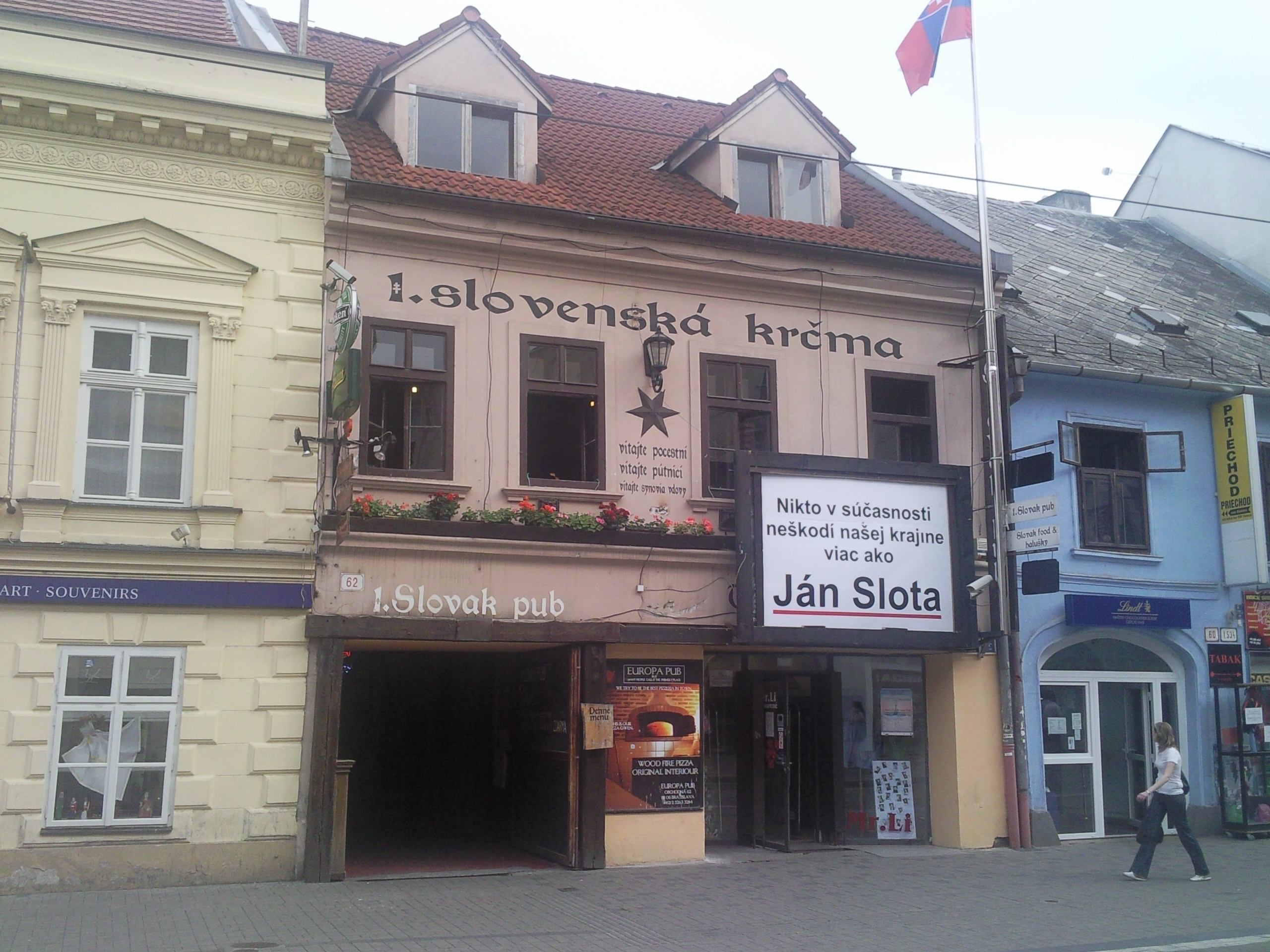 Slovak pub, Bratislava